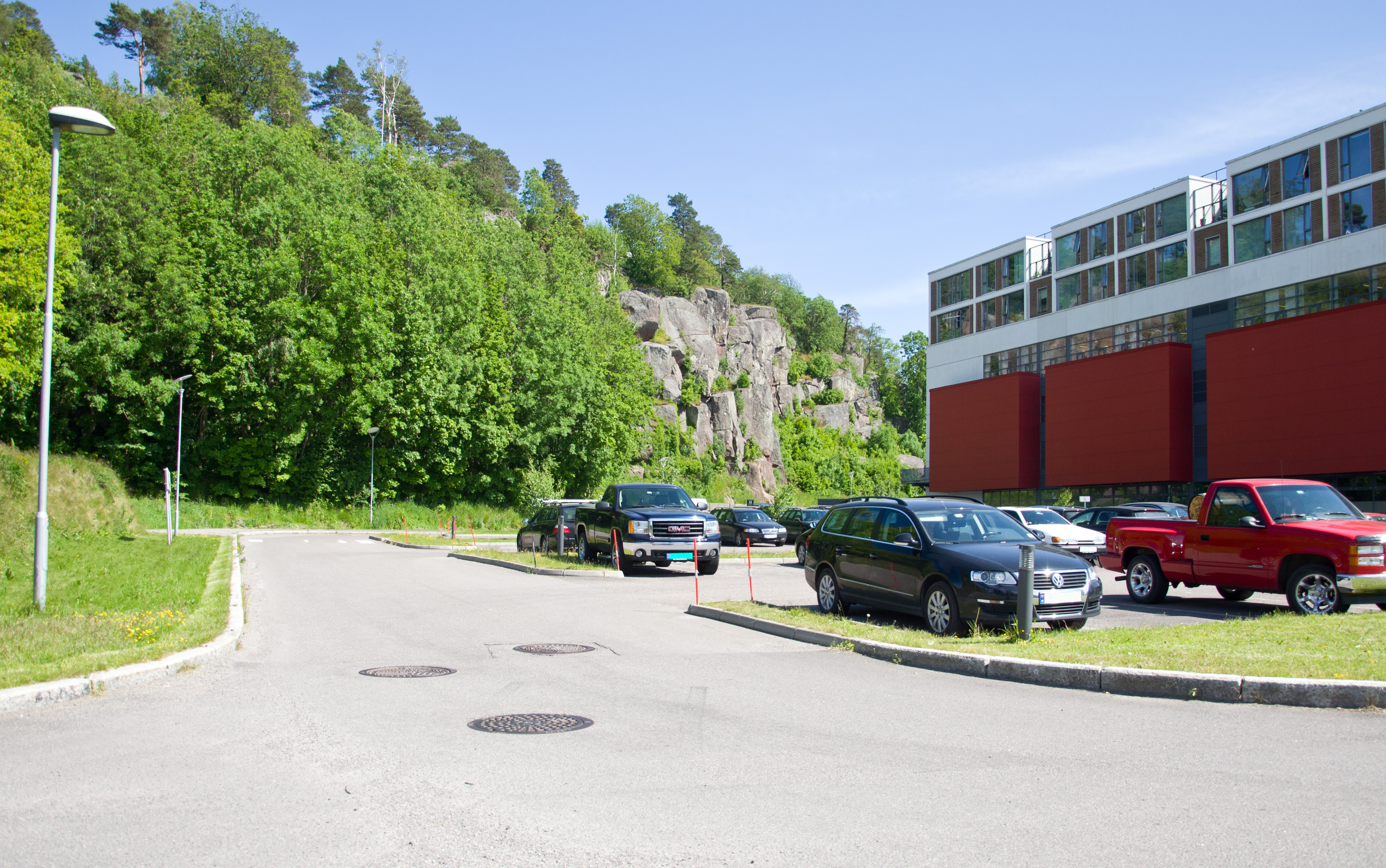 Kilden